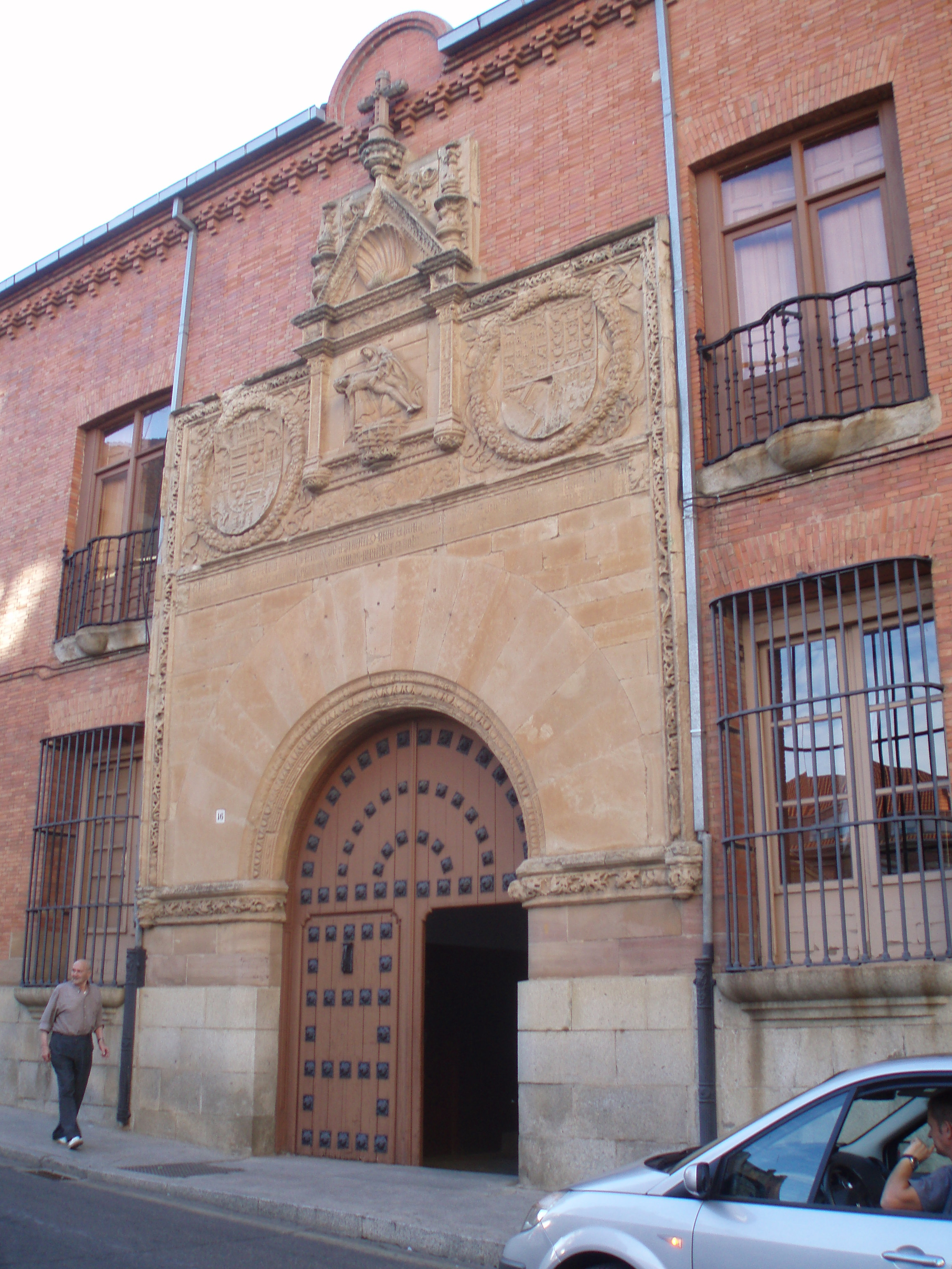 Benavente, en la Provincia de Zamora. (España).